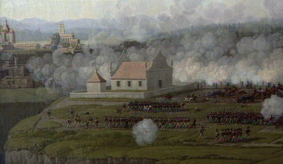 Беларуская (тарашкевіца): Полацак (Połacak), Ксавэрыя (Ksaveryja). Касьцёл Магілы Гасподняй і Францішка Ксавэрыя